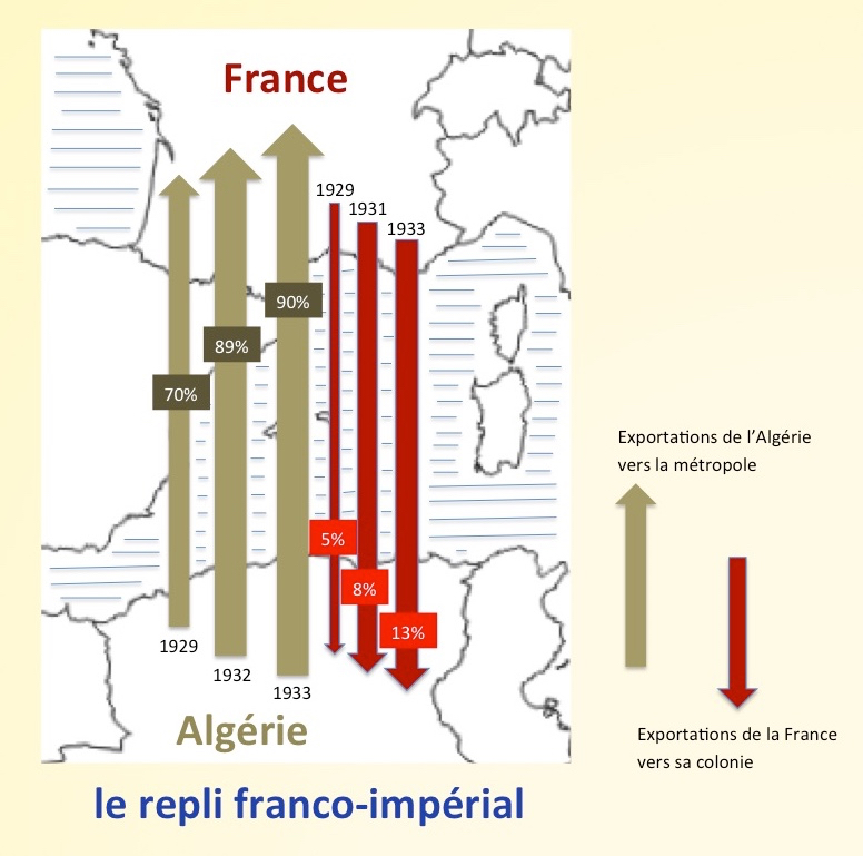 Repli franco-impérial, échanges entre la France et sa colonie algérienne, années 1930. Fond de carte utilisé : Cartes géographiques gratuites pour un usage non commercial.